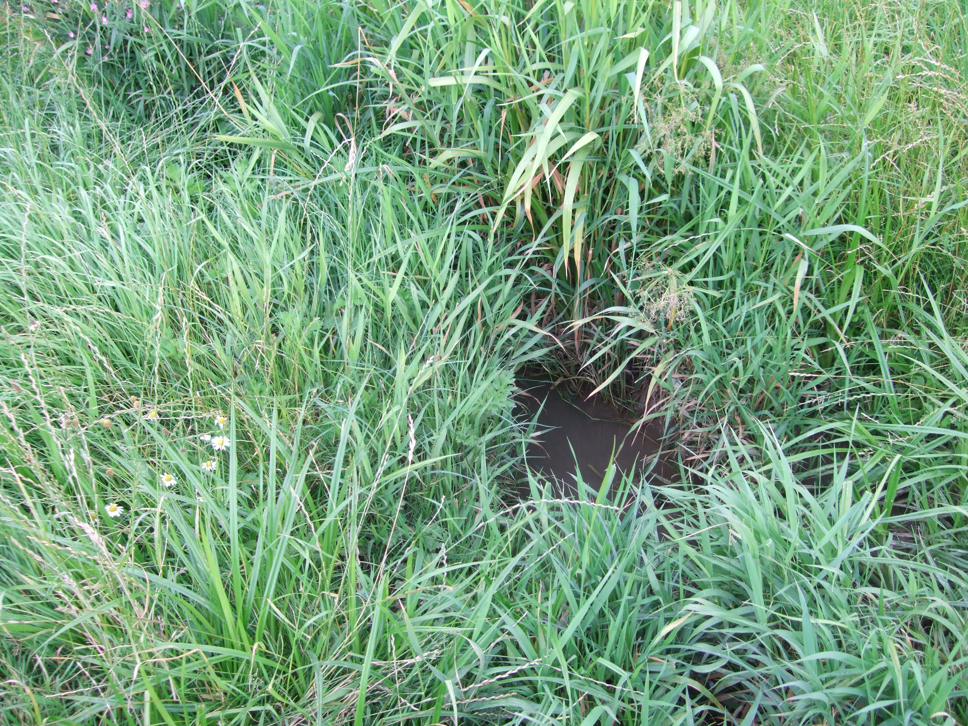 Schleichenbach bei Usingen